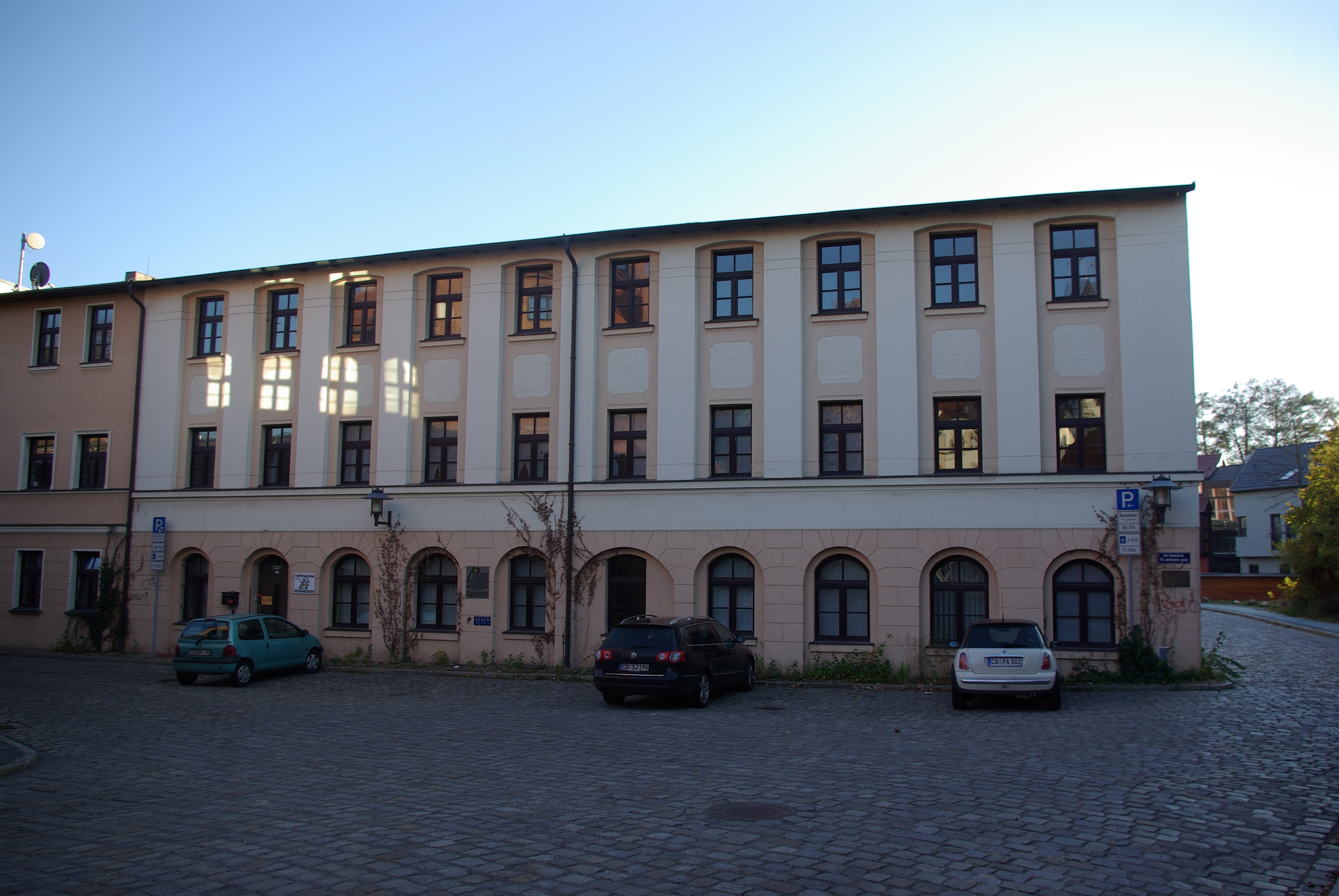 Cottbus in Brandenburg. Das Haus steht unter Denkmalschutz. Am Haus befindet sich eine Tafel zum Gedenken an die Arbeiterbewegung. Hier befand sich 1918 der Sitz des Arbeiter und Soldatenrates.